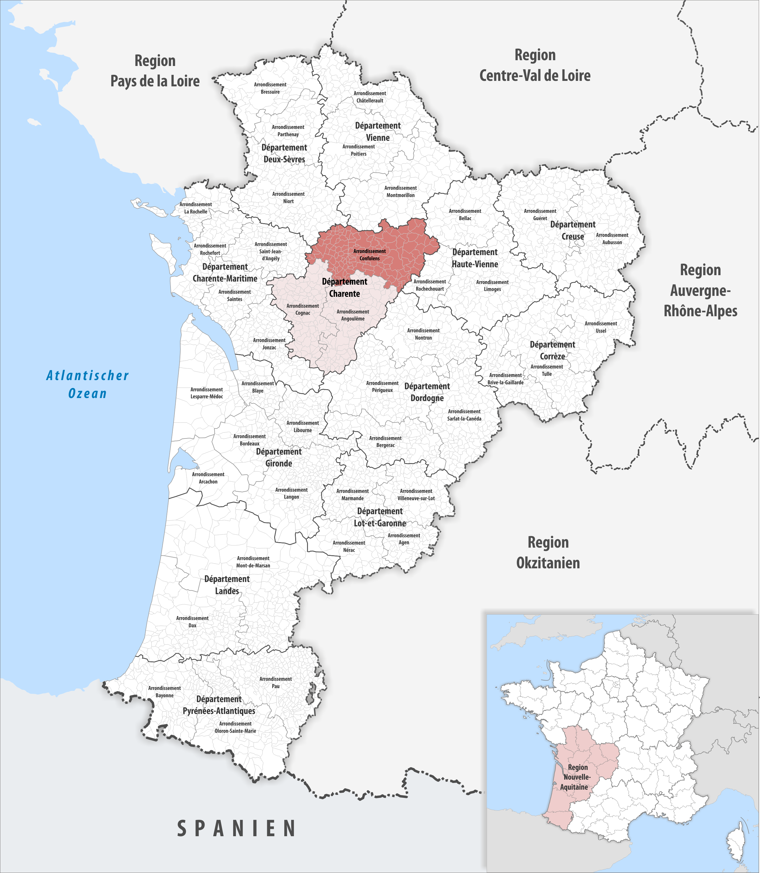 Lage des Arrondissements Confolens